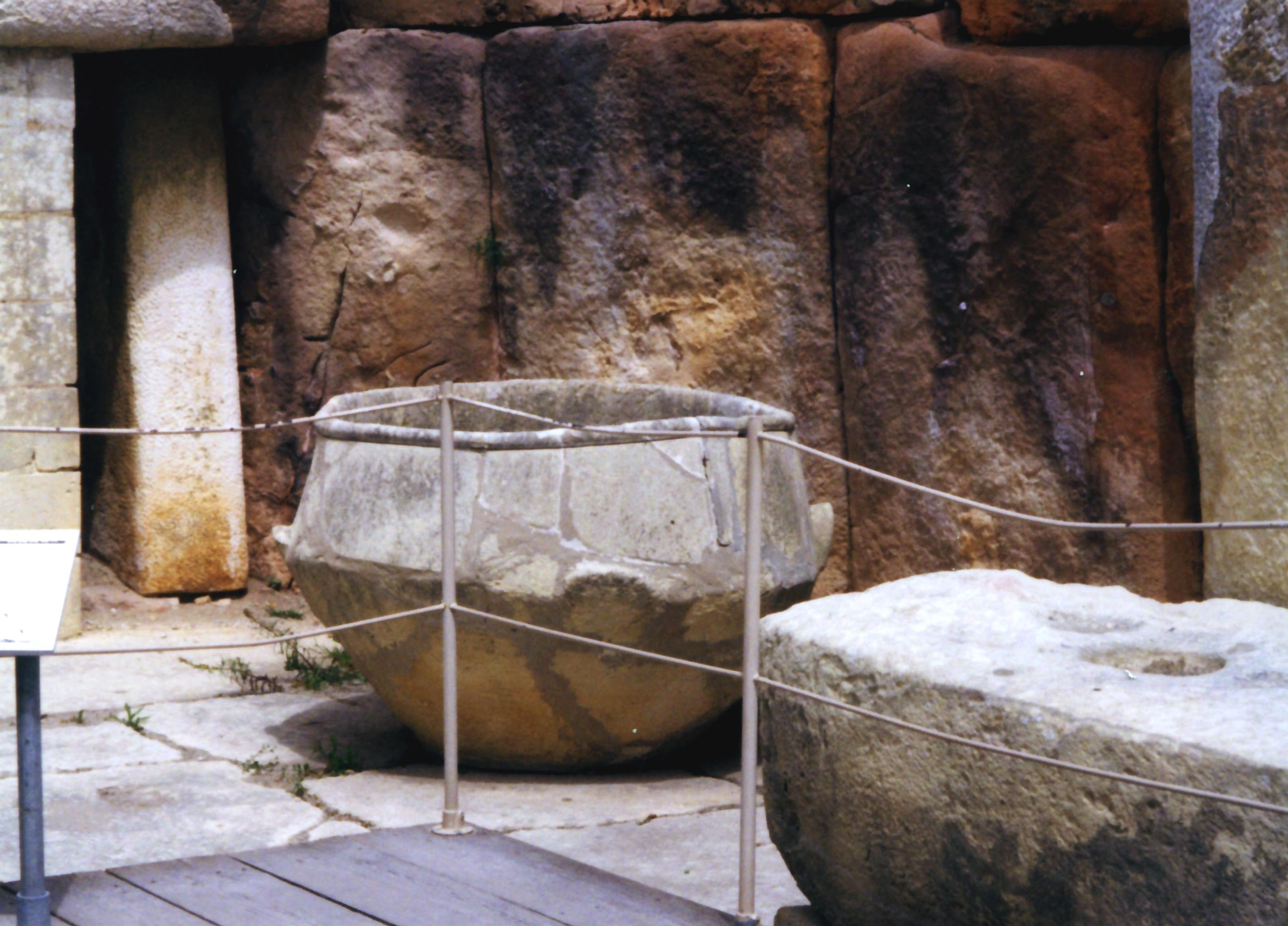 Tarxien, megalit templom (Málta)